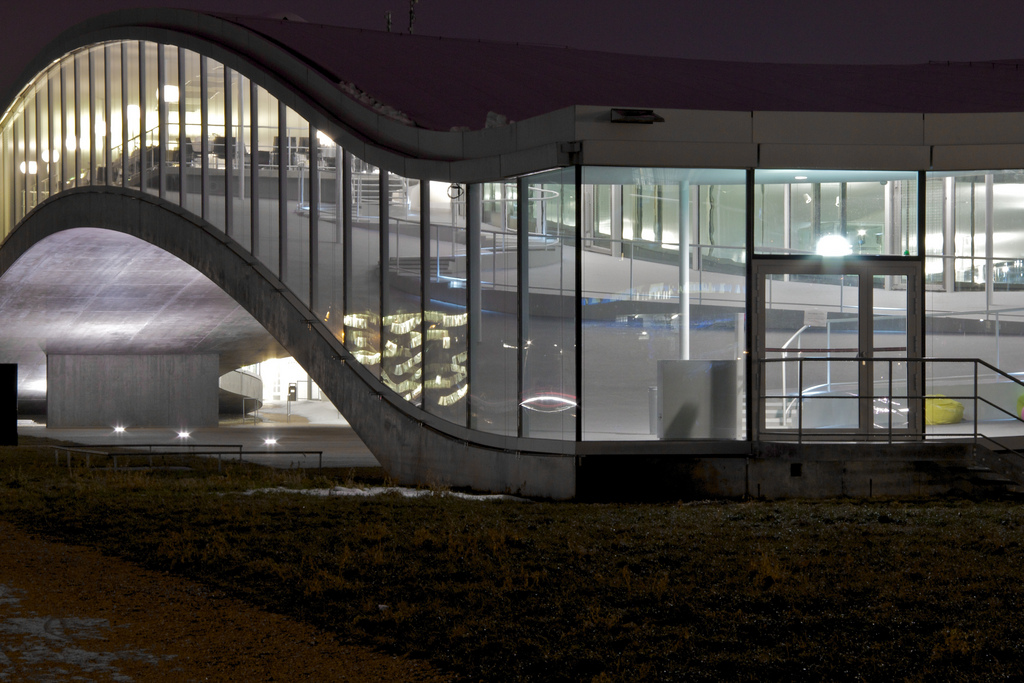 Un détail de cette architecture étonnante.